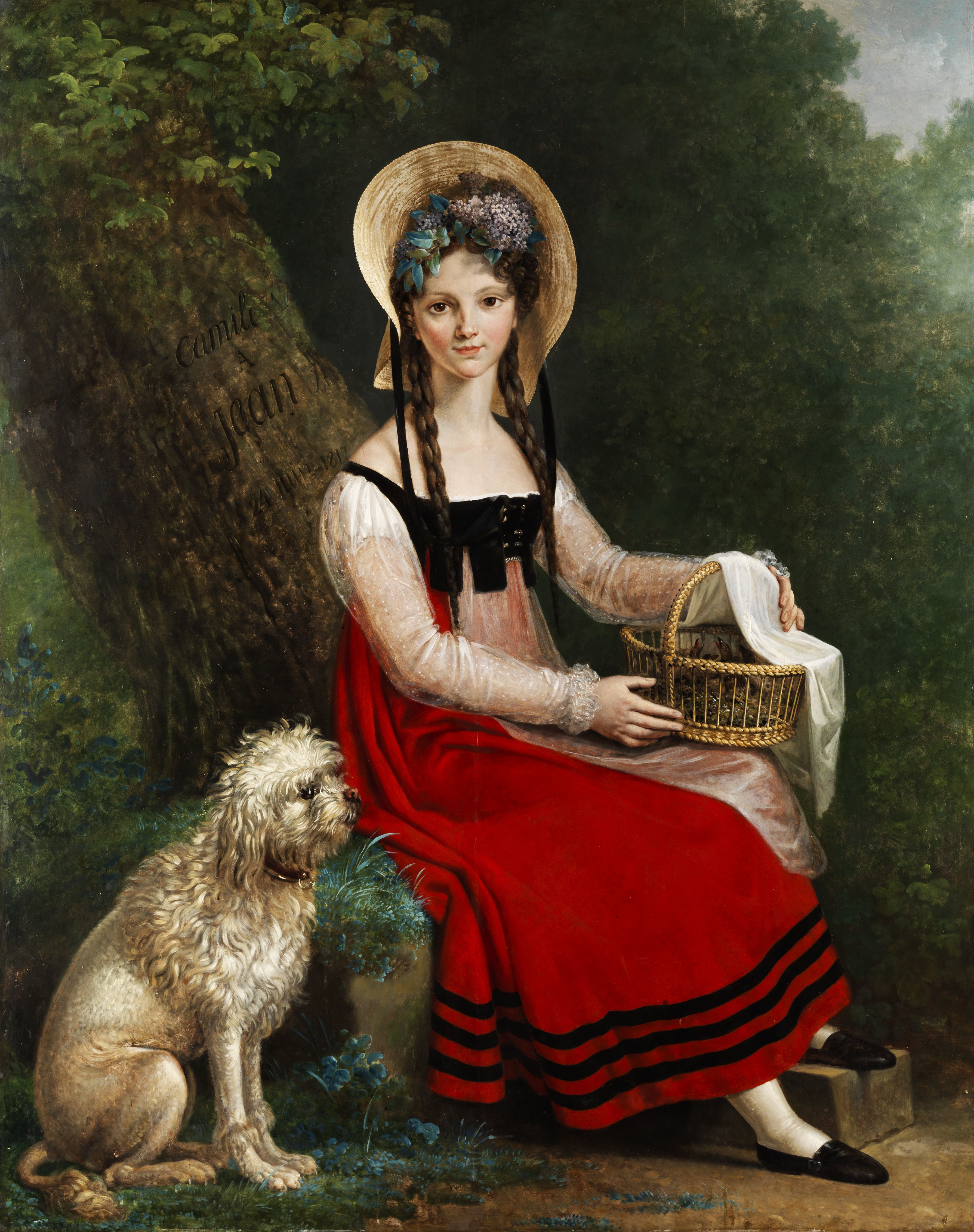 Junges Mädchen mit Pudel auf einer Rasenbank Öl auf Holz (Stilumkreis Vigée-Lebrun). Widmung in die Rinde des Baumes geritzt „CAMILE/ A/ JEAN.../ 24 JUIN 1817""